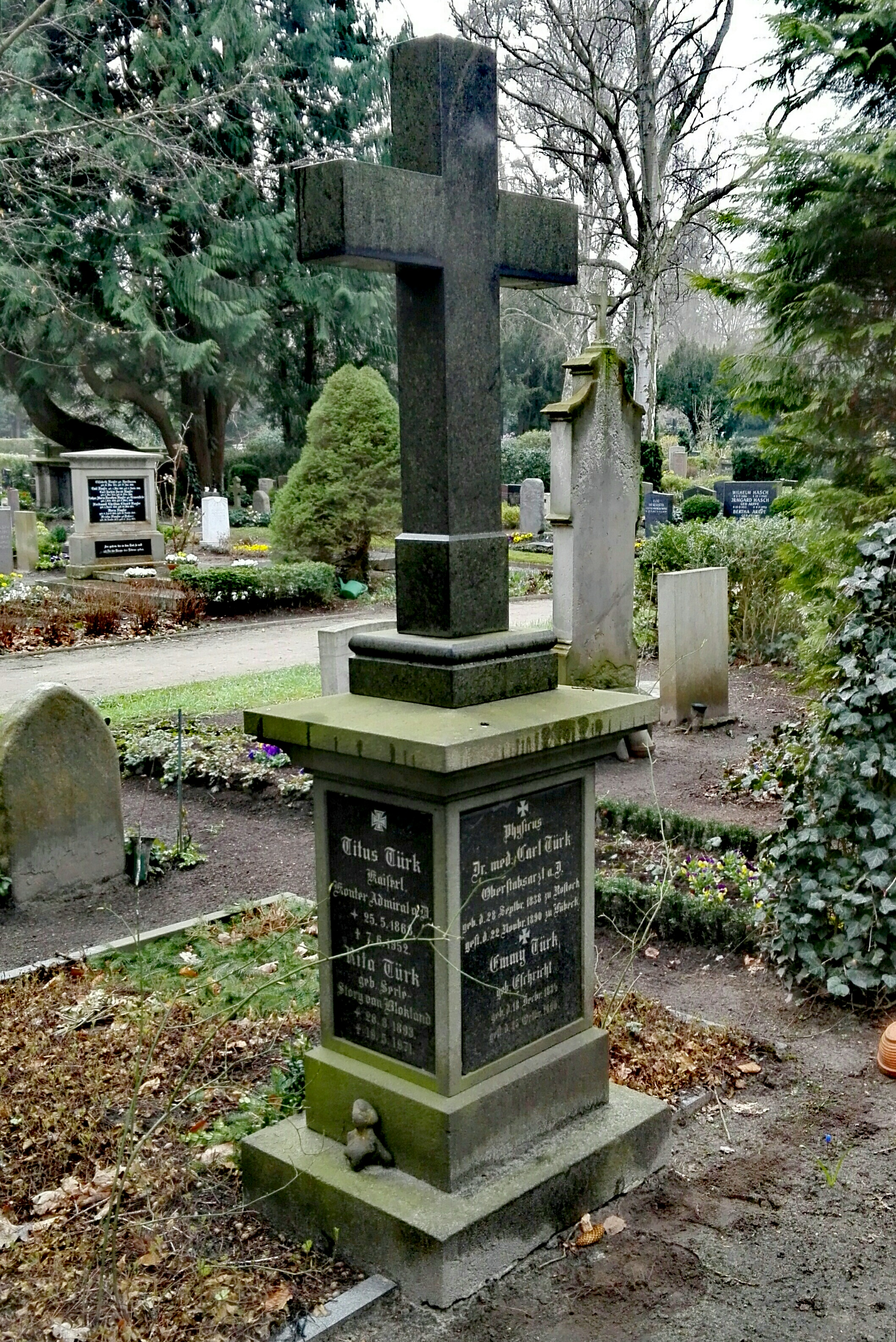 Familiengrab Türk mit Carl, Emmy, Titus und Rita